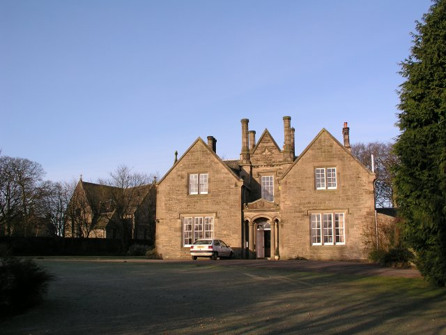 Manse and Kirk at Kirknewton